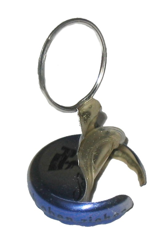 Kronkorken mit Abziehlasche